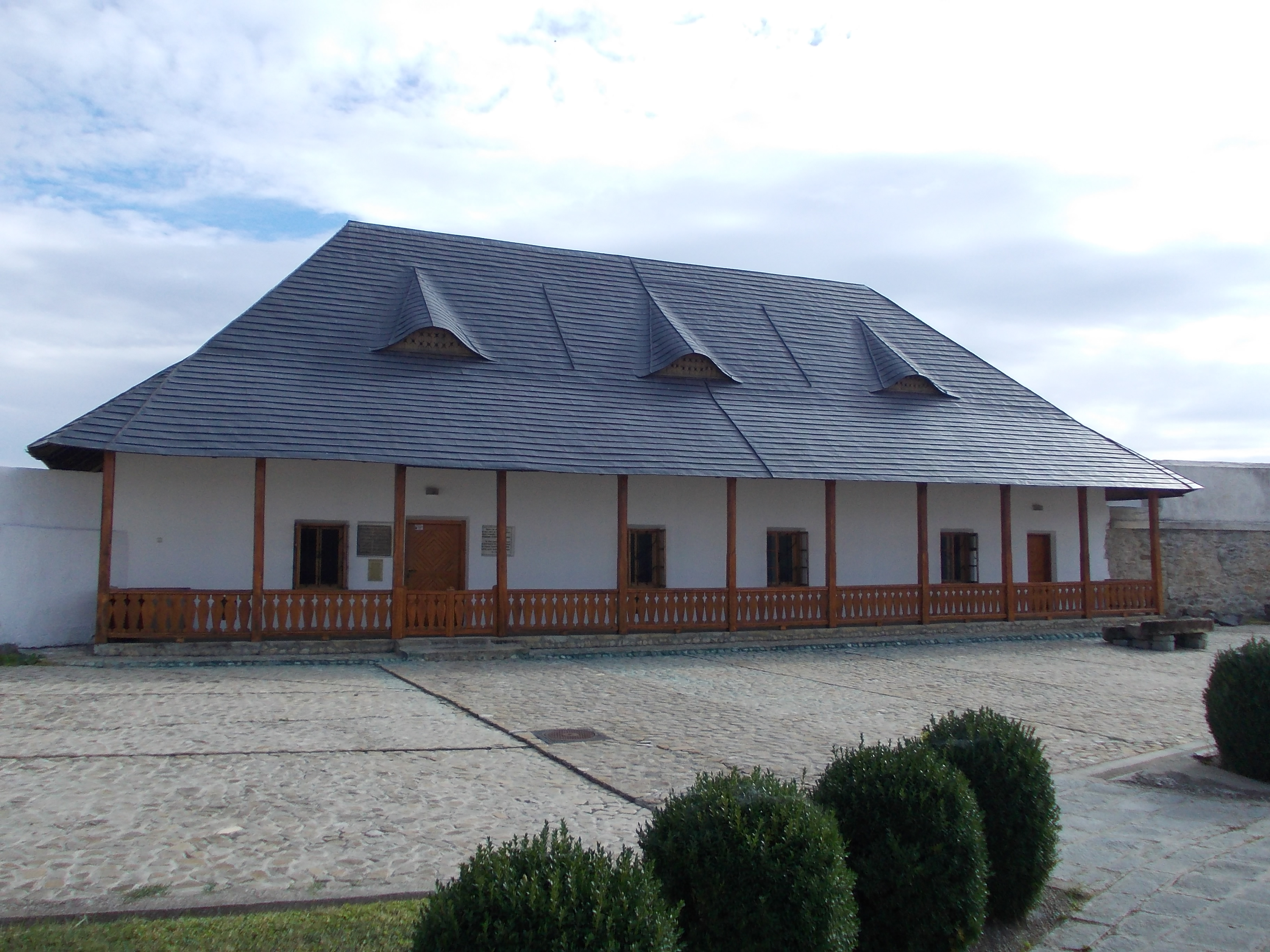 Casa Veniamin Costachi 02